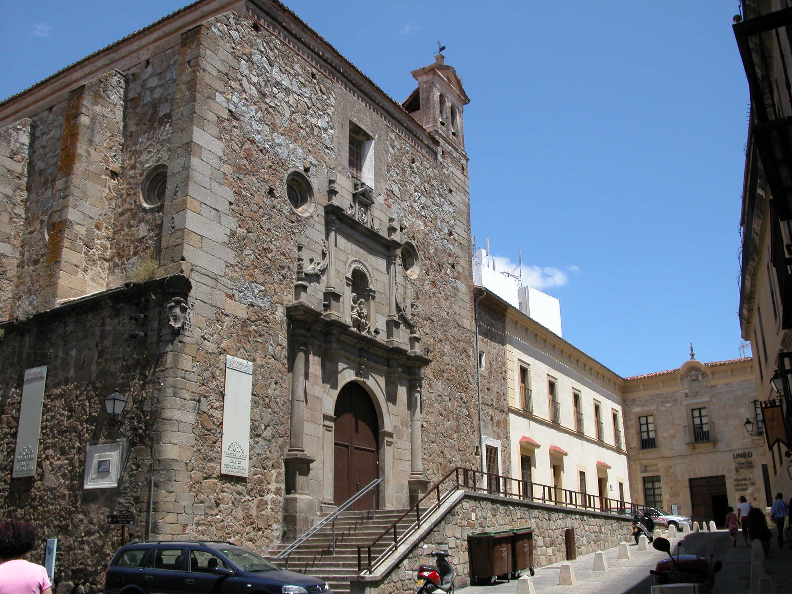 Iglesia de Santa Ana en Plasencia